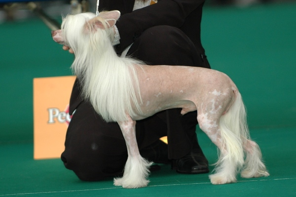 Chinese gekuifde naakthond. Categorie:Afbeelding hond